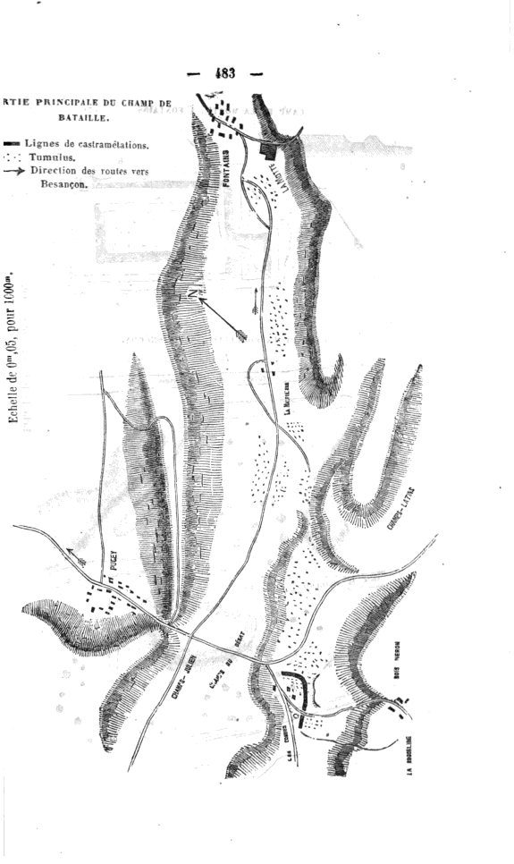 Tumulus localisés entre Pugey, Fontain et Bonnet-Rond